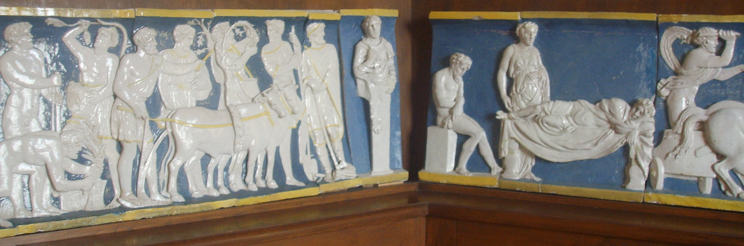 Villa medicea di Poggio a Caiano, inside Fregio (taken from outside) bu Andrea Sansovino in Poggio a Caiano, Italy